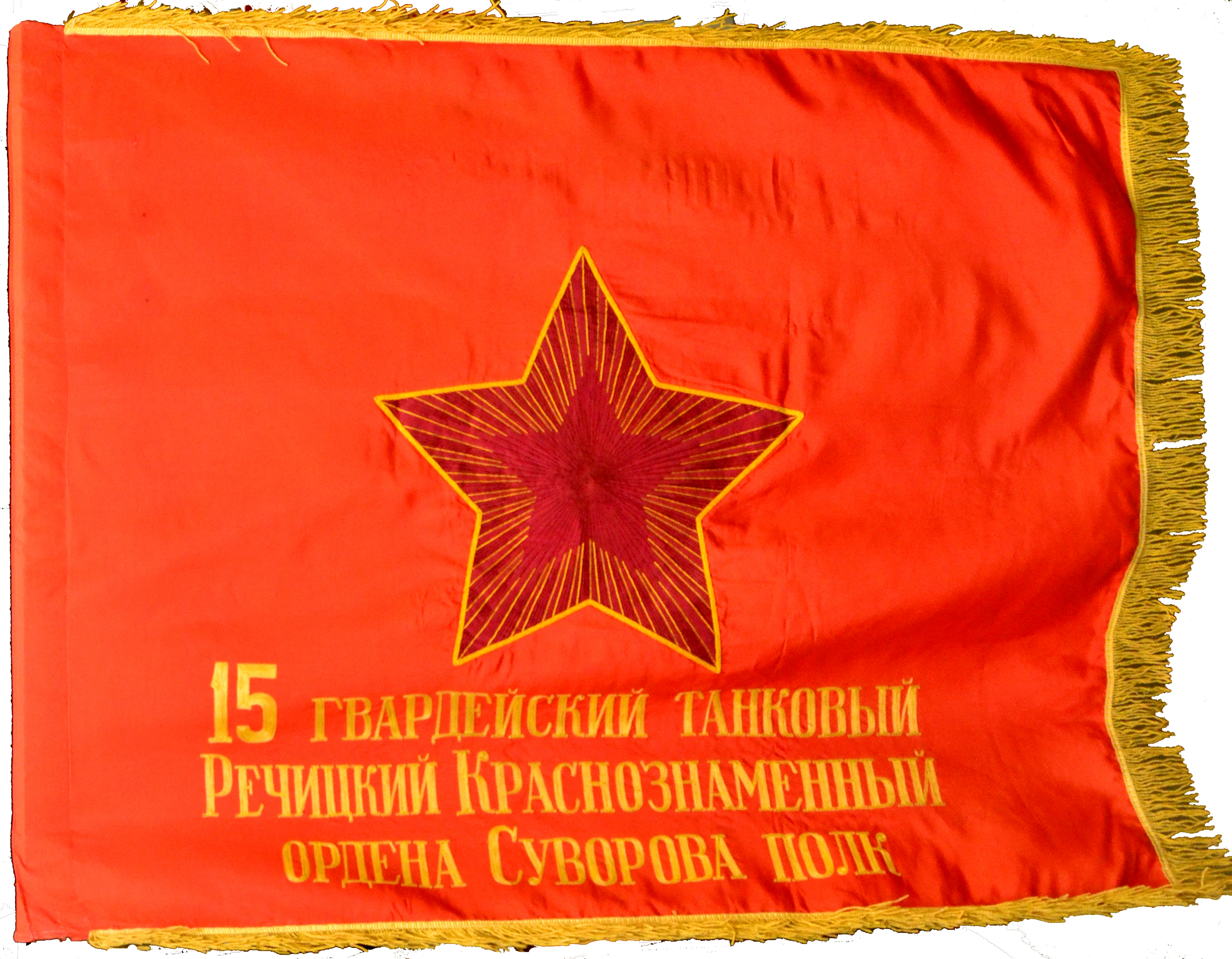 Знамя 15-го гвардейского танкового полка. Аверс